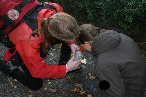 Demosanitäter in roter Einsatzjacke und Rettungsrucksack spühlt einer Demonstrantin die Augen aus.